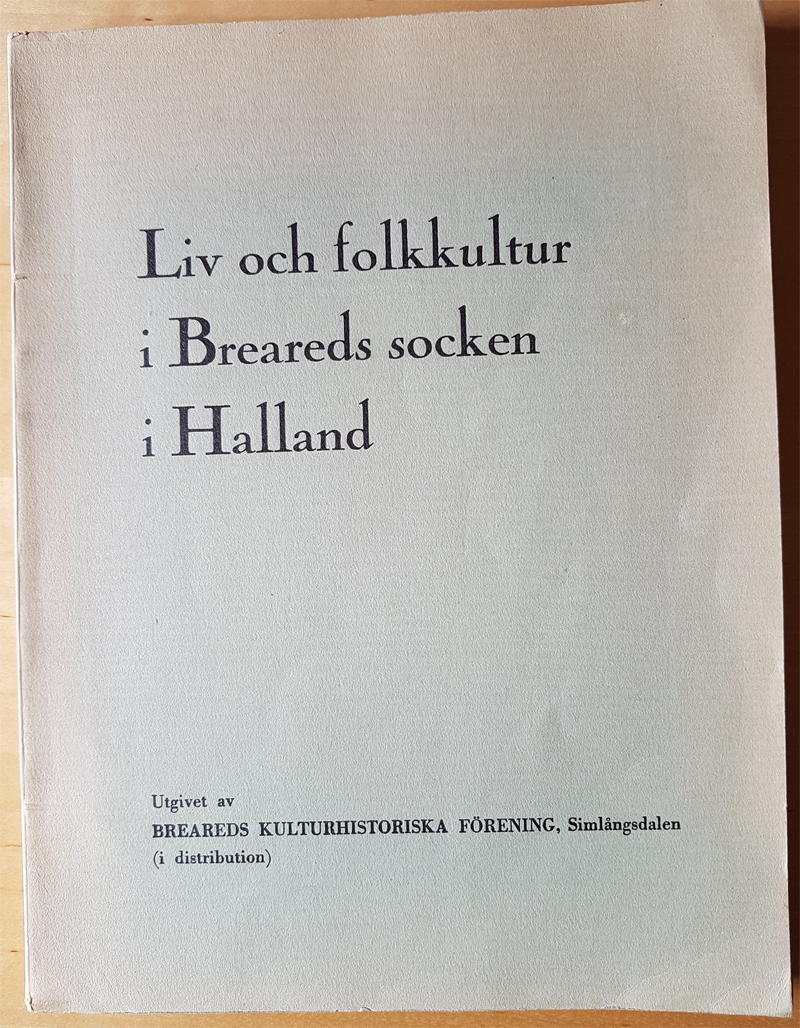 Den första publikation som 1951 utgavs av Breareds kulturhistoriska förening.